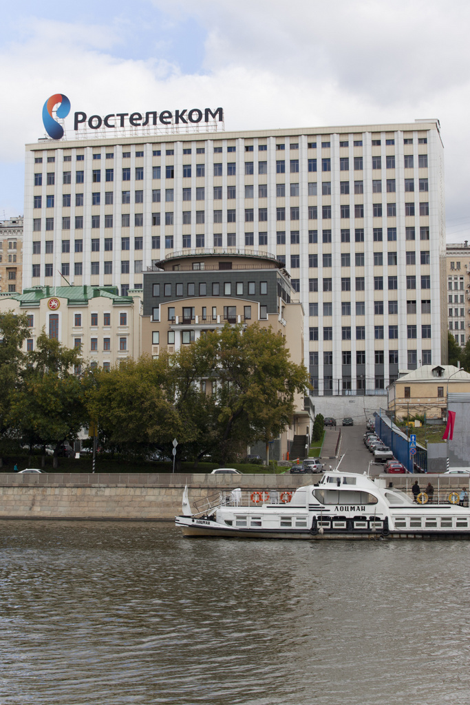 Главный офис ПАО «Ростелеком» (Москва, ул. Гончарная, д. 30)